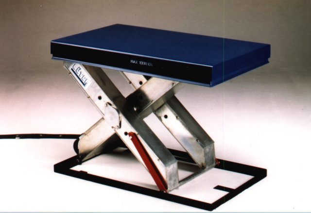 Erster Hubtisch der Büter Hebetechnik GmbH.